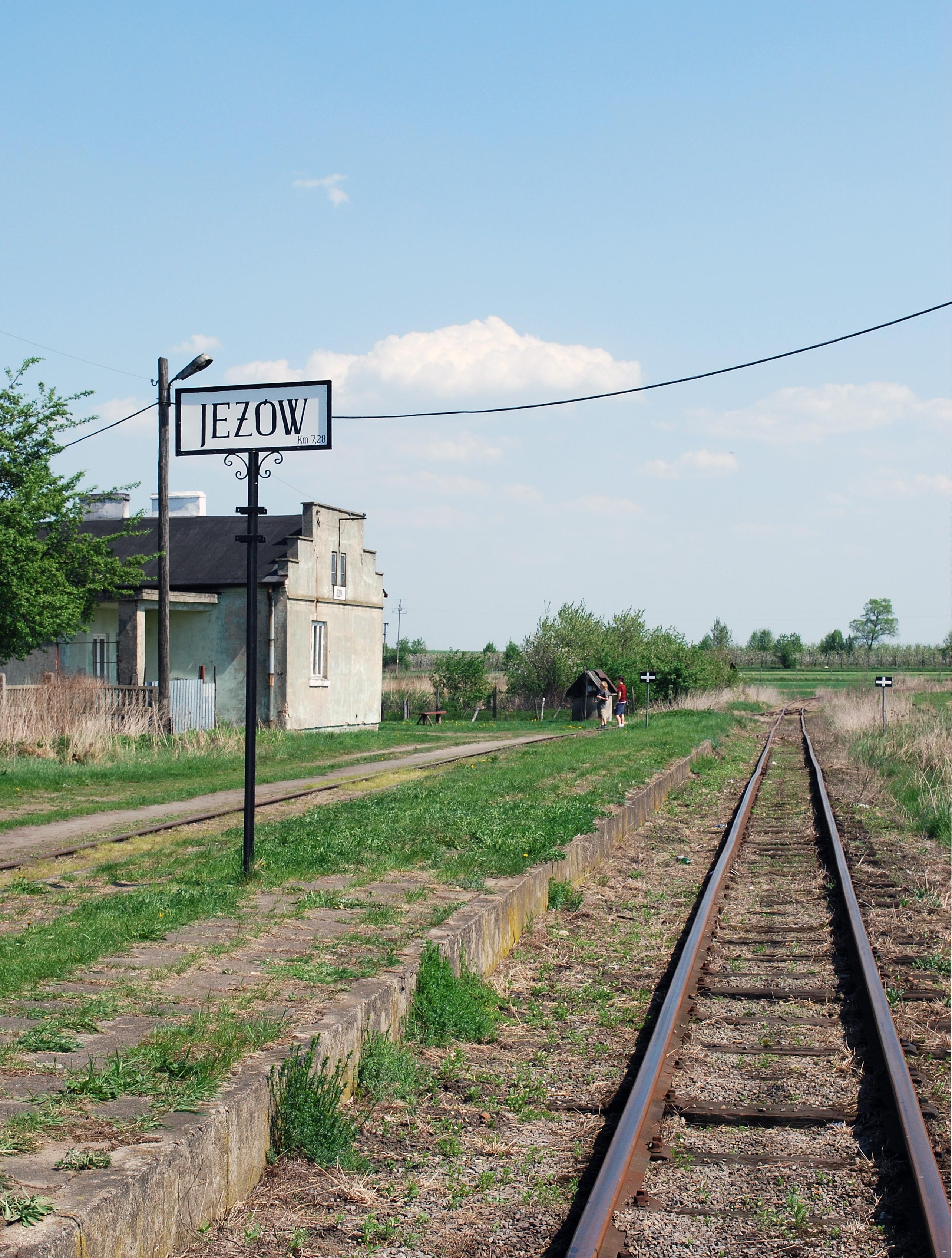 Rogowska Kolej Wąskotorowa Jeżów wąskotorowy - dawny budynek dworcowy, obecnie budynek mieszkalny.